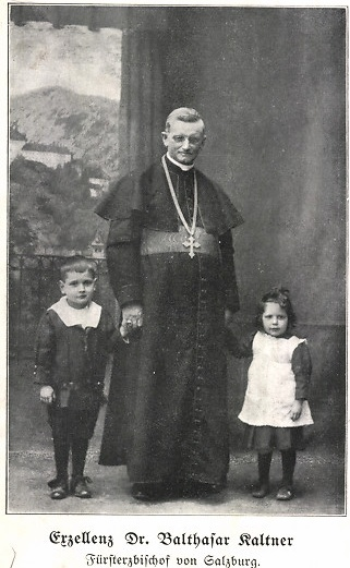 Fürstbischof Balthasar Kaltner